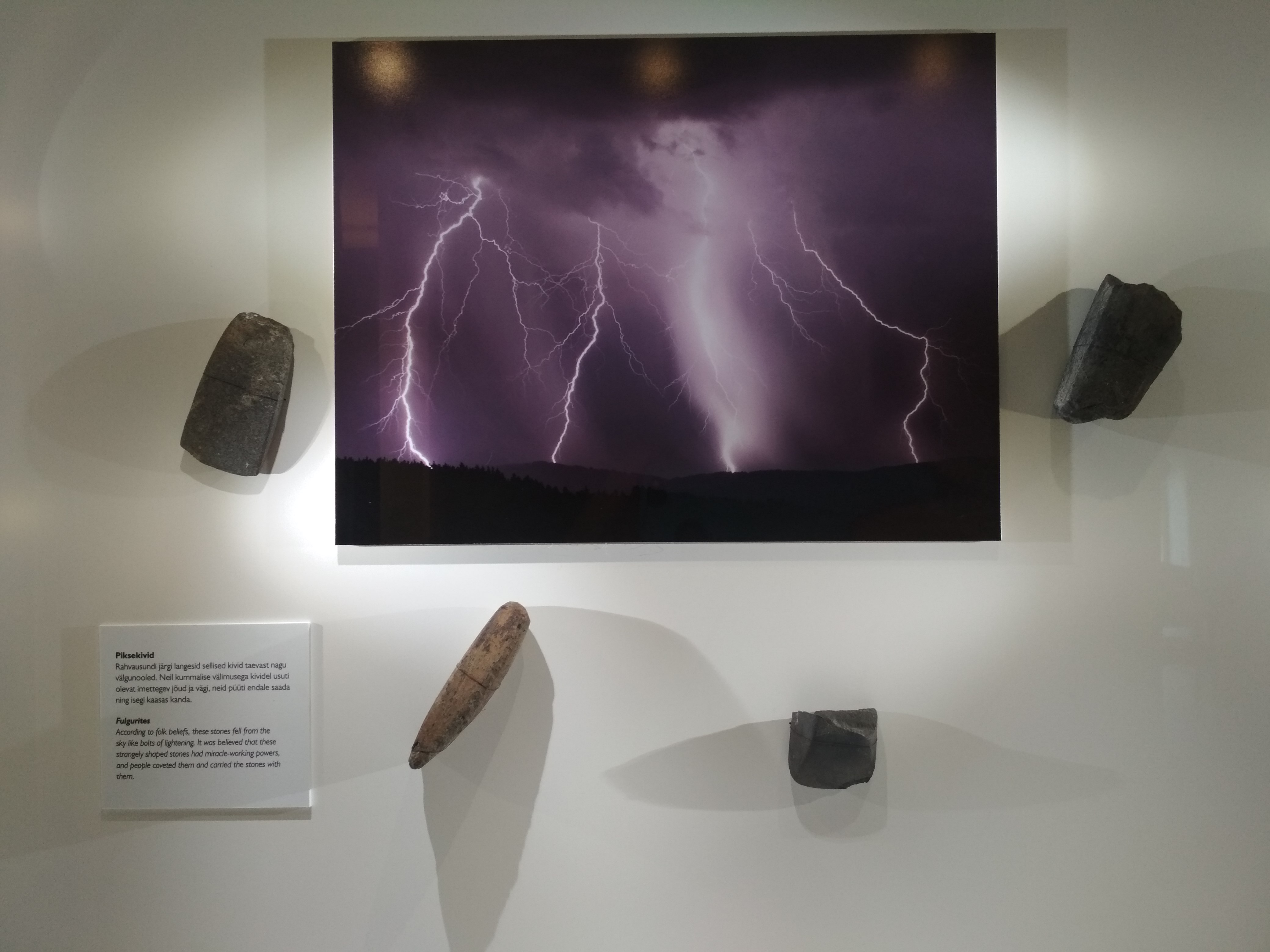 Piksekivid Pärnu muuseumis